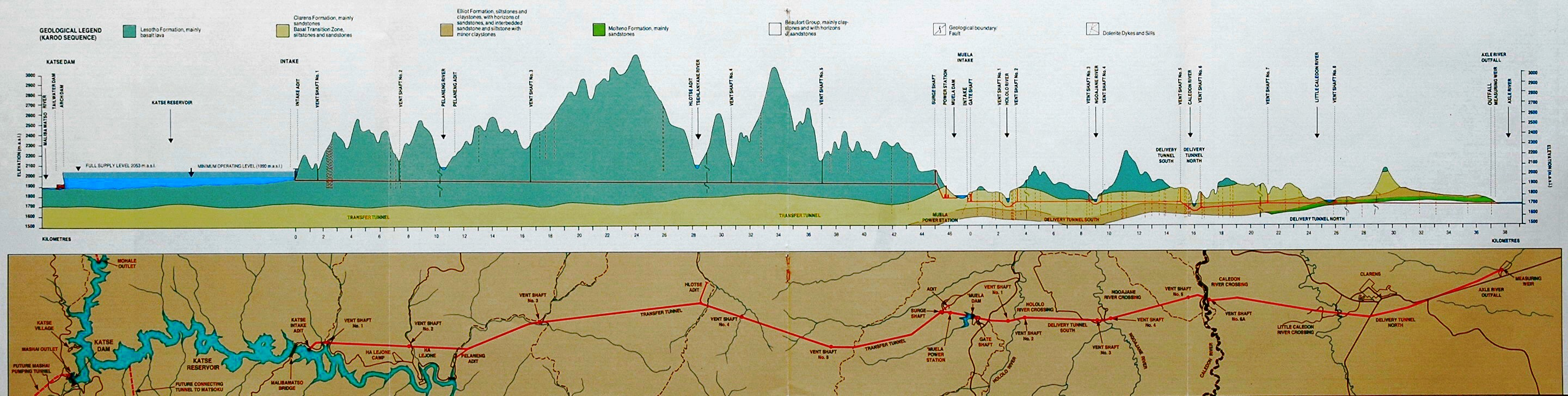 1A szakasz geológiai hosszmetszet és helyszínrajzLesotho Highlands Water Project (LHWPA) Section 1A geological longitudinal section and site plan